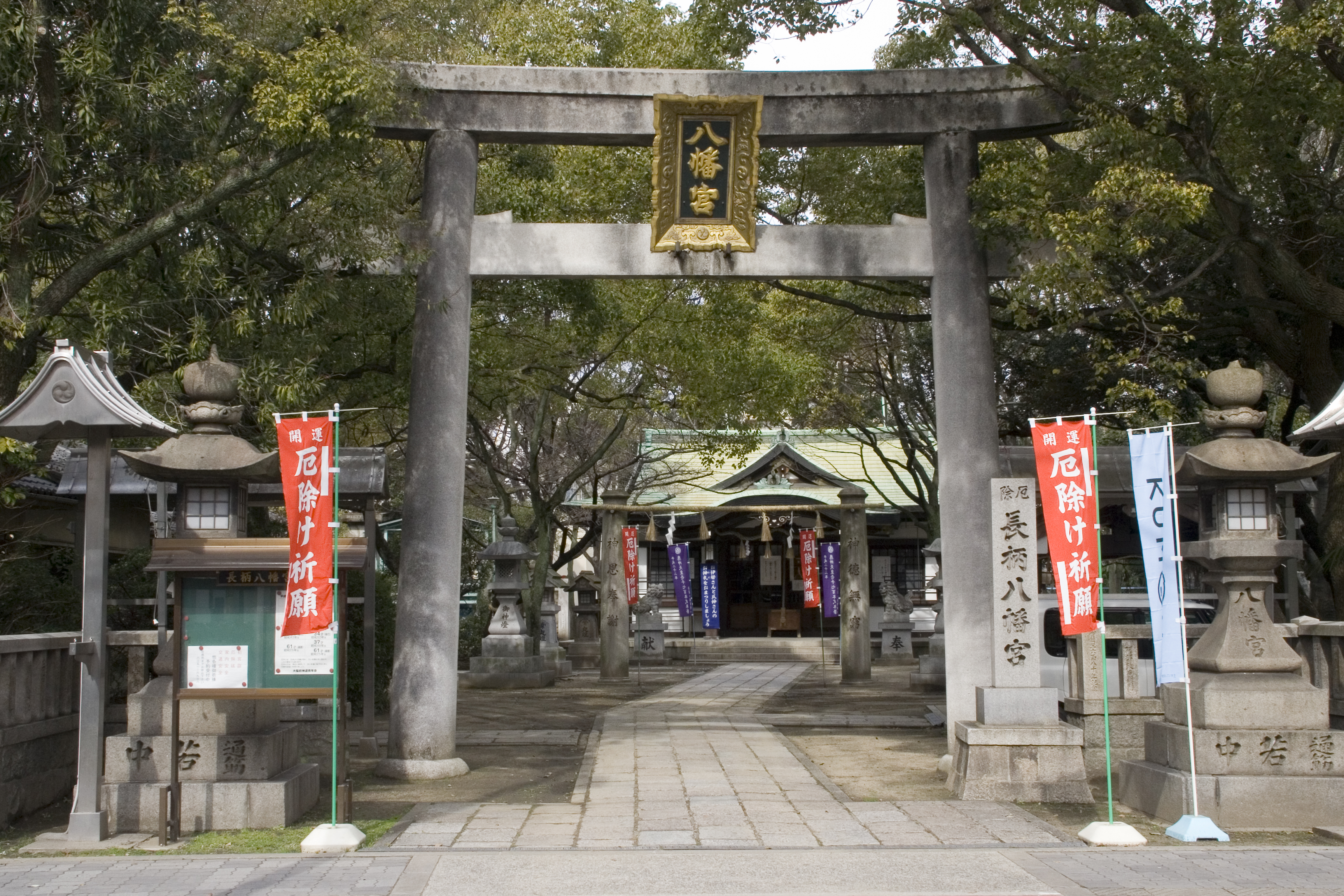 長柄八幡宮